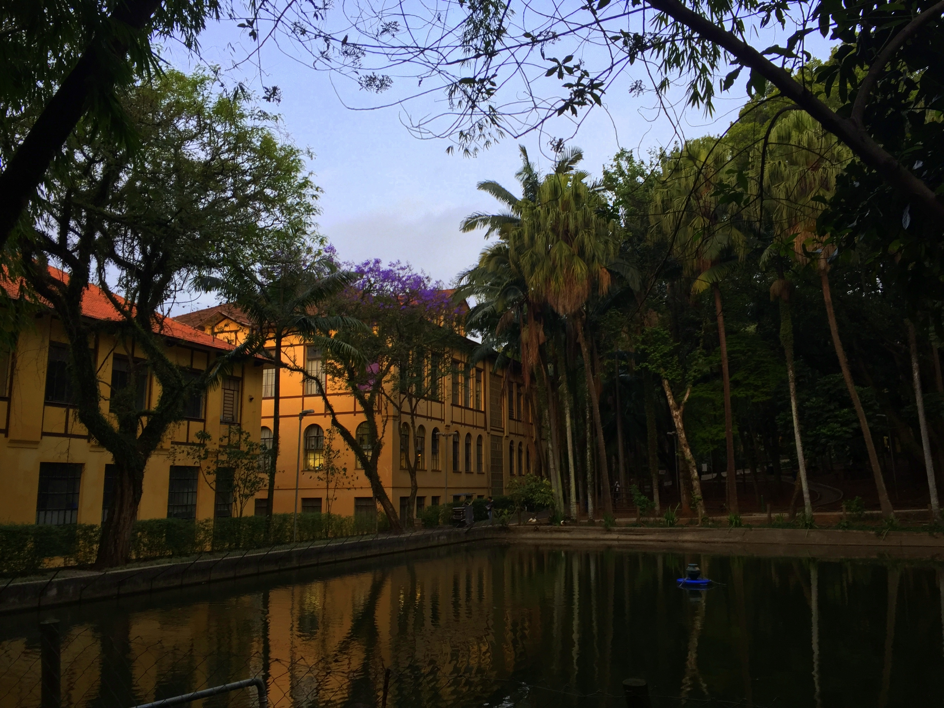 Lago Parque da Água Branca, em São Paulo (SP), Brasil.